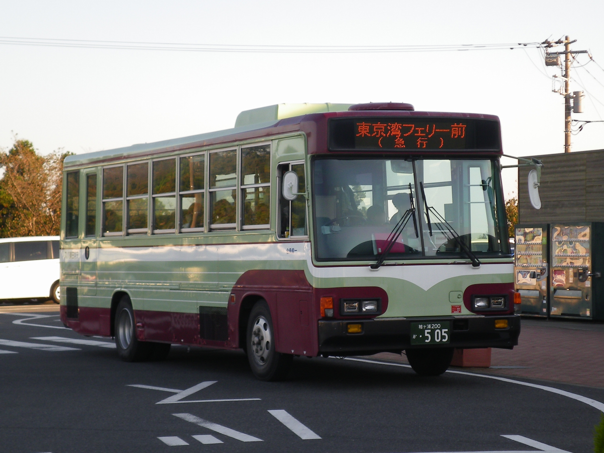 いすゞ・ジャーニーK 袖ケ浦200か505 マザー牧場にて撮影